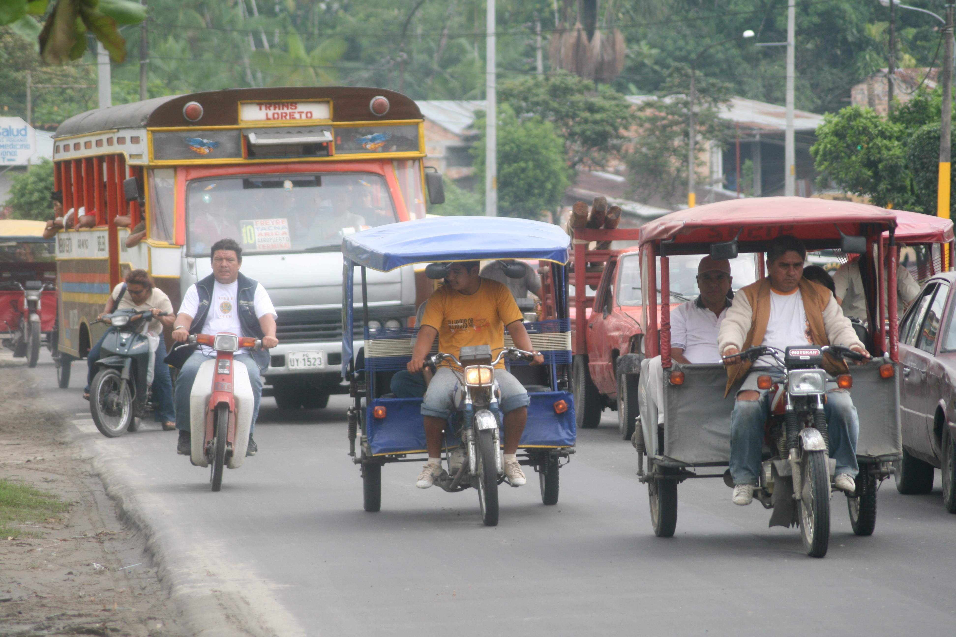 Iquitos traffic